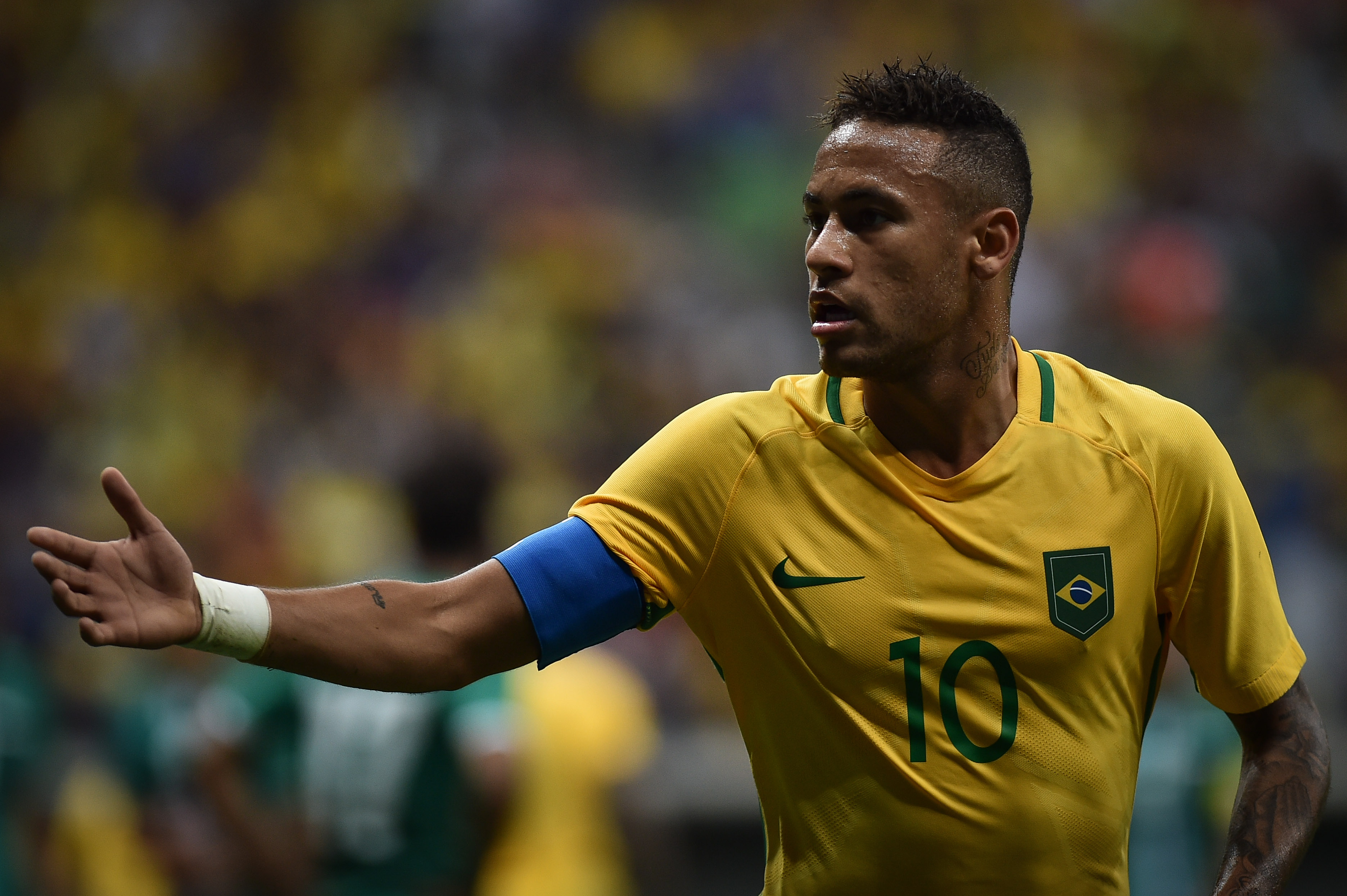 Estádio Nacional de Brasília Mané Garrincha, Brasília, DF, Brasil, 7/8/2016 Foto: Andre Borges/Agência Brasília. Brasil e Iraque jogam neste domingo (7), no Estádio Mané Garrincha, pelo grupo A do futebol masculino nas Olimpíadas 2016.